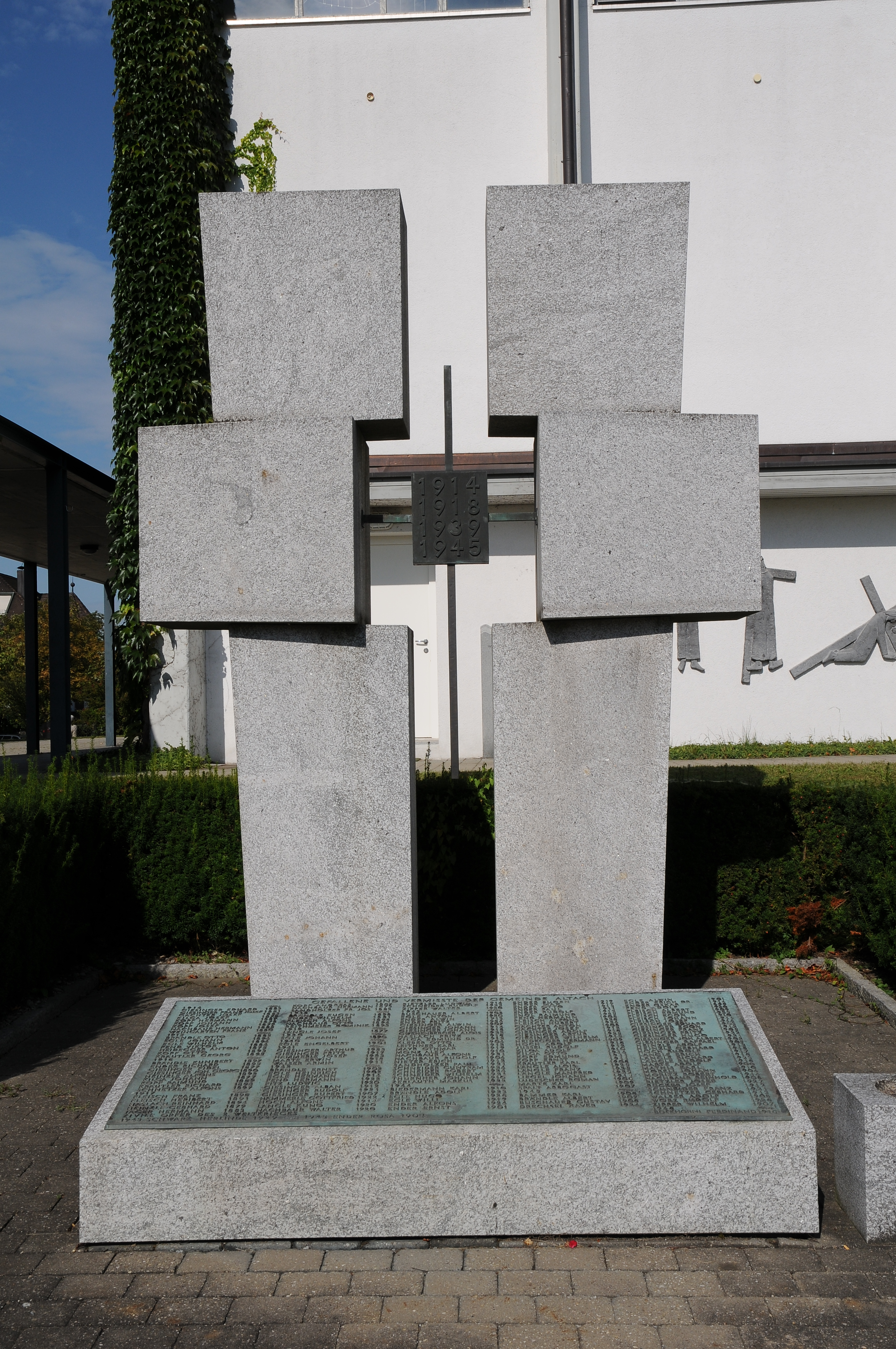 Kriegerdenkmal in Altach; Info Dieses Objekt steht unter Denkmalschutz.